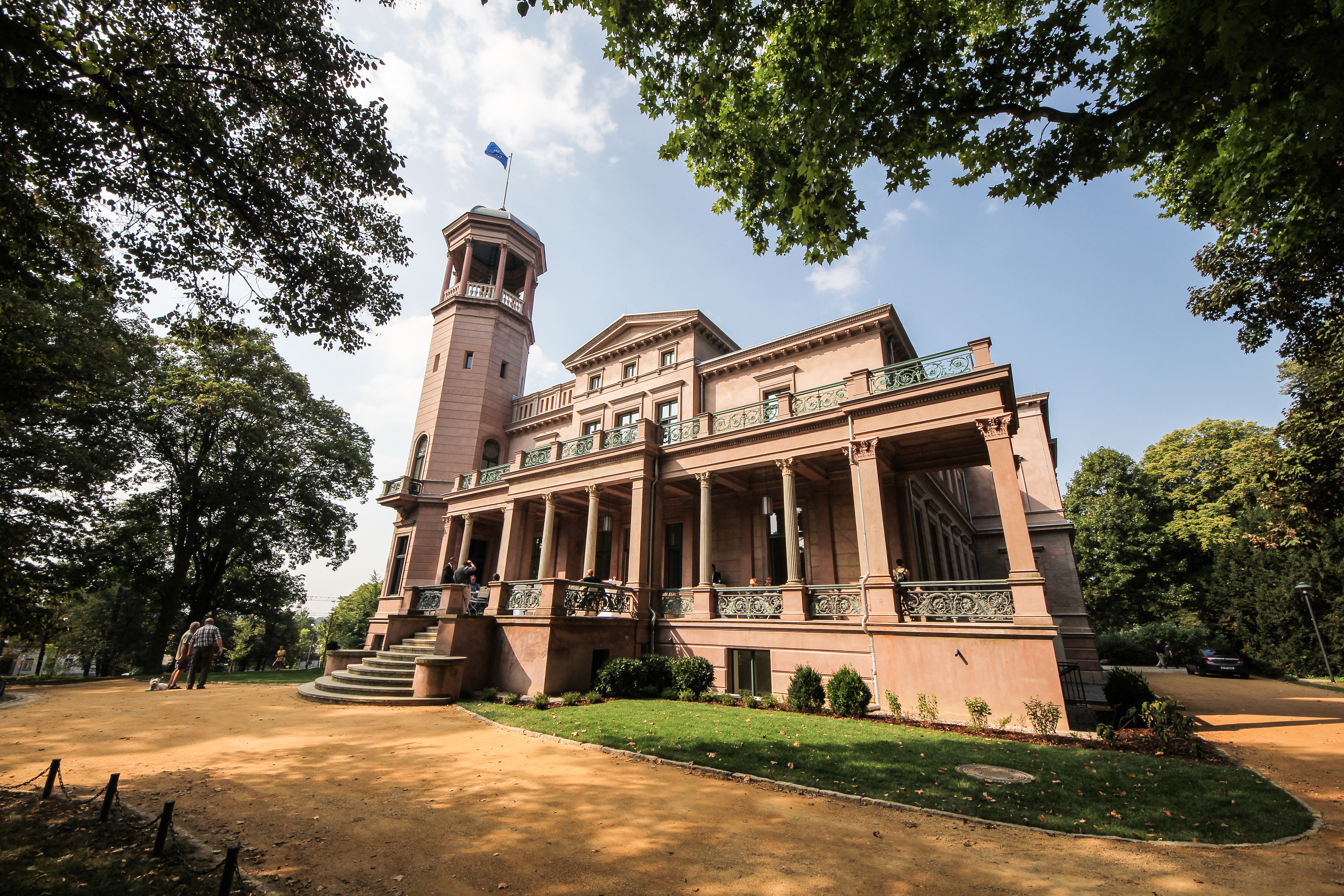 Ostseite des Schlosses